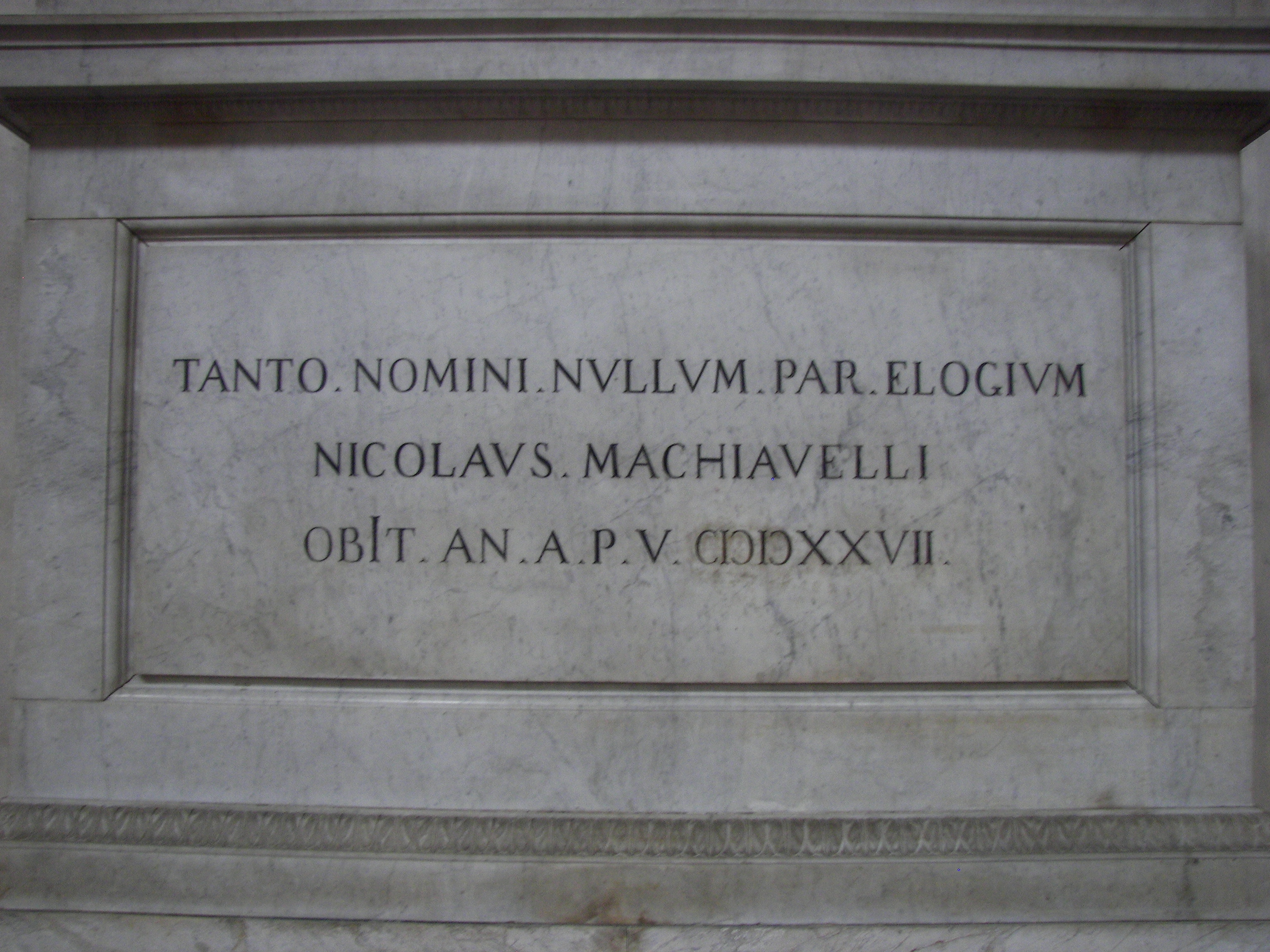 Closeup of cenotaph for Niccolò Machiavelli in Santa Croce in Firenze.